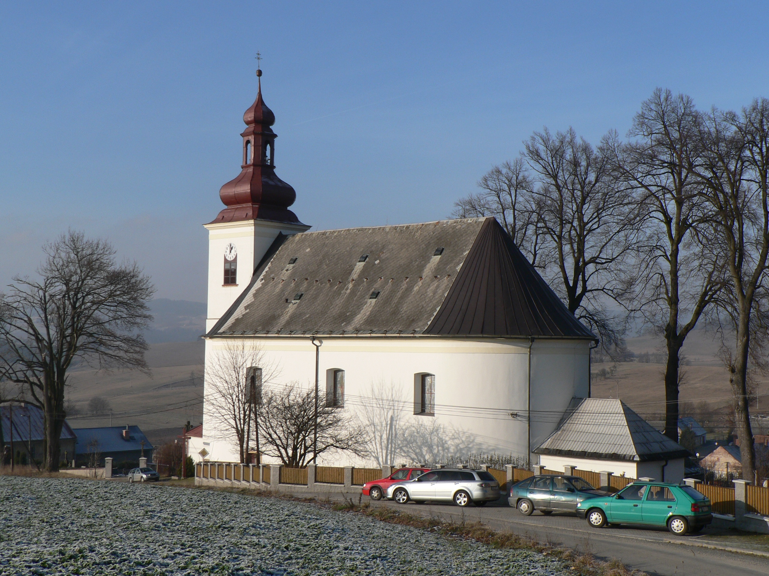 Kostel svatého Jana Křtitele (Jedlí)